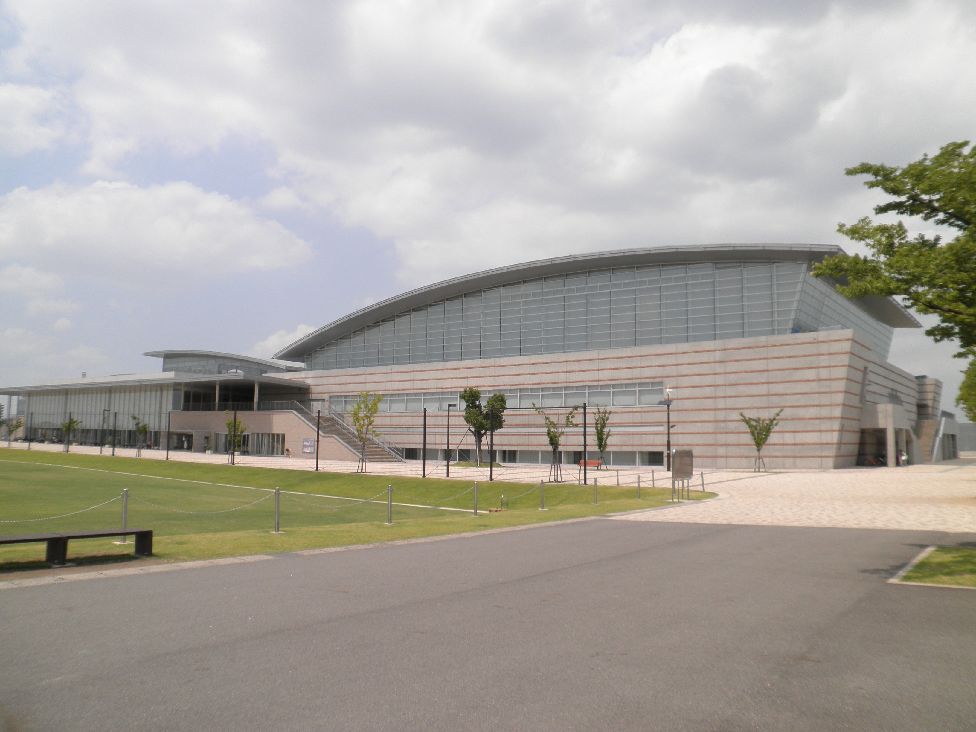 愛知県刈谷市の刈谷市総合運動公園内にあるウイングアリーナ刈谷